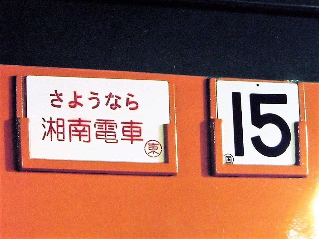 2006-3-17に113系に挿入されたサボ 湘南電車最終日